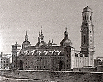 «Templo de Nuestra Señora del Pilar». Grabado de 1806. Detalle